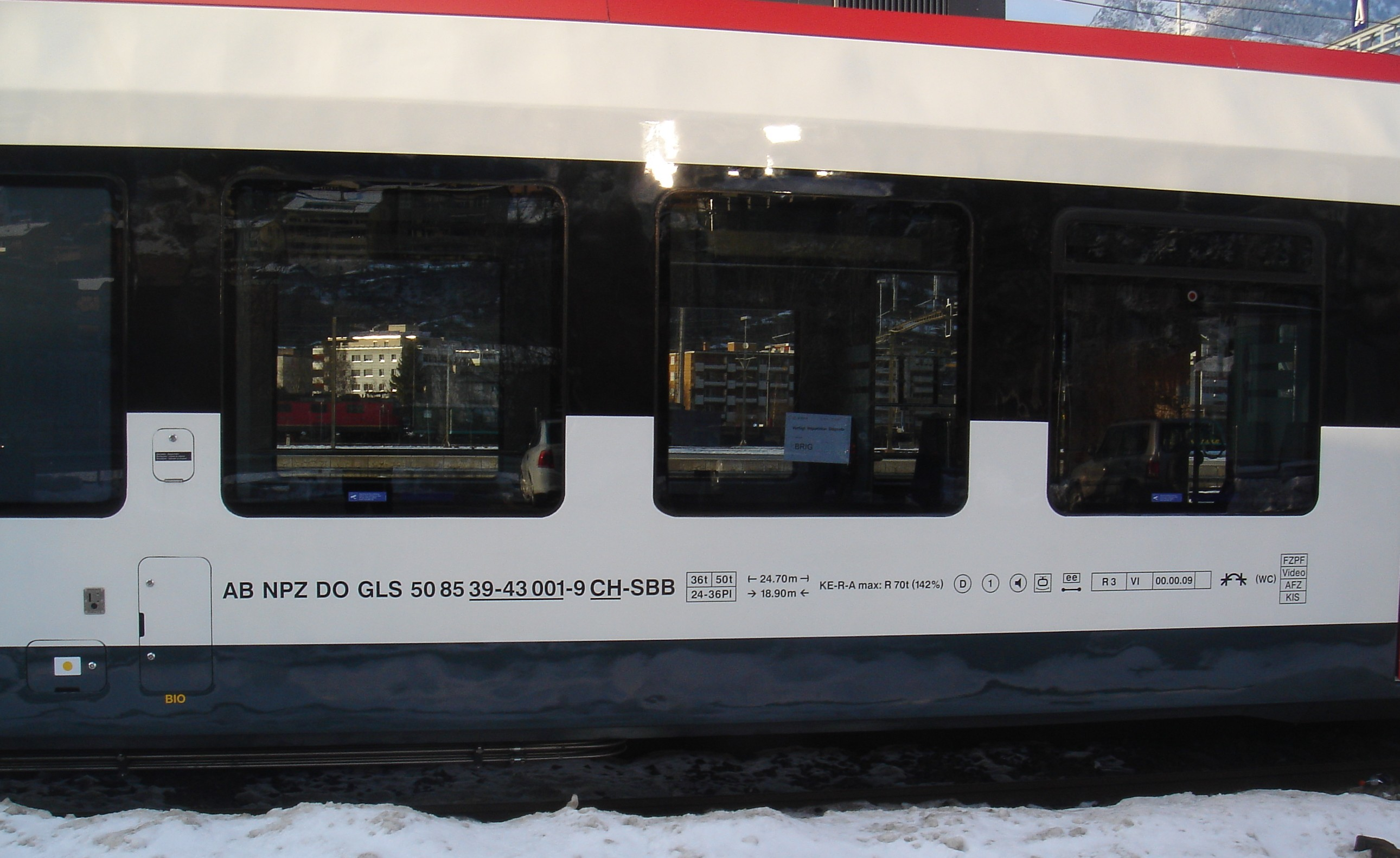 Neuer NPZ Domino Zwischenwagen für den Glarner Sprinter in Brig; Detailansicht der Anschriften